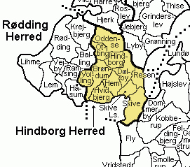 old Viborg Amt, Denmark Source: 'Map by Svend-Erik Christiansen